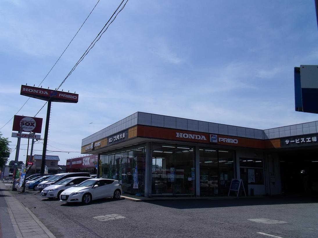 2010年6月自作にて撮影